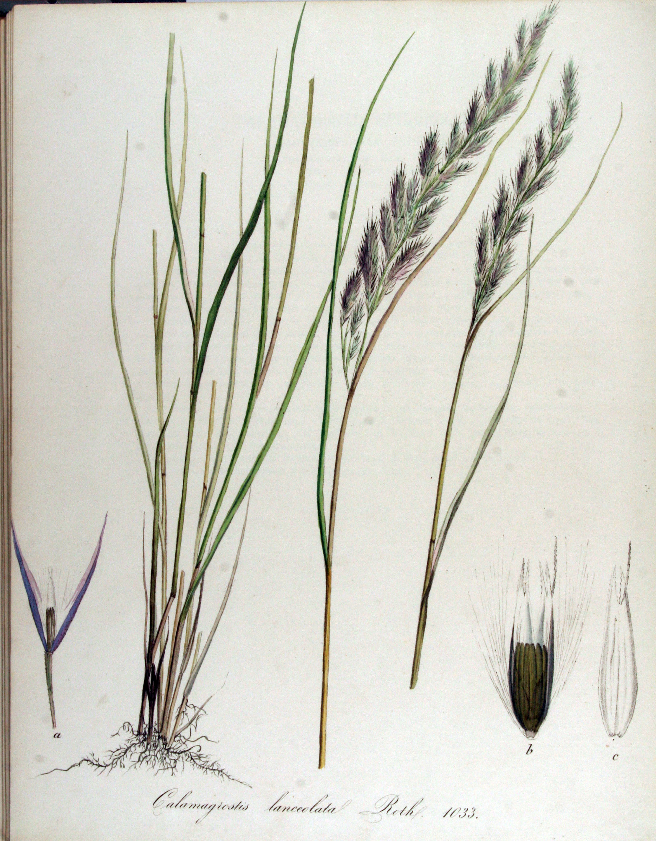 Calamagrostis canescens (Weber) Roth (Syn. Calamagrostis lanceolata Roth.)